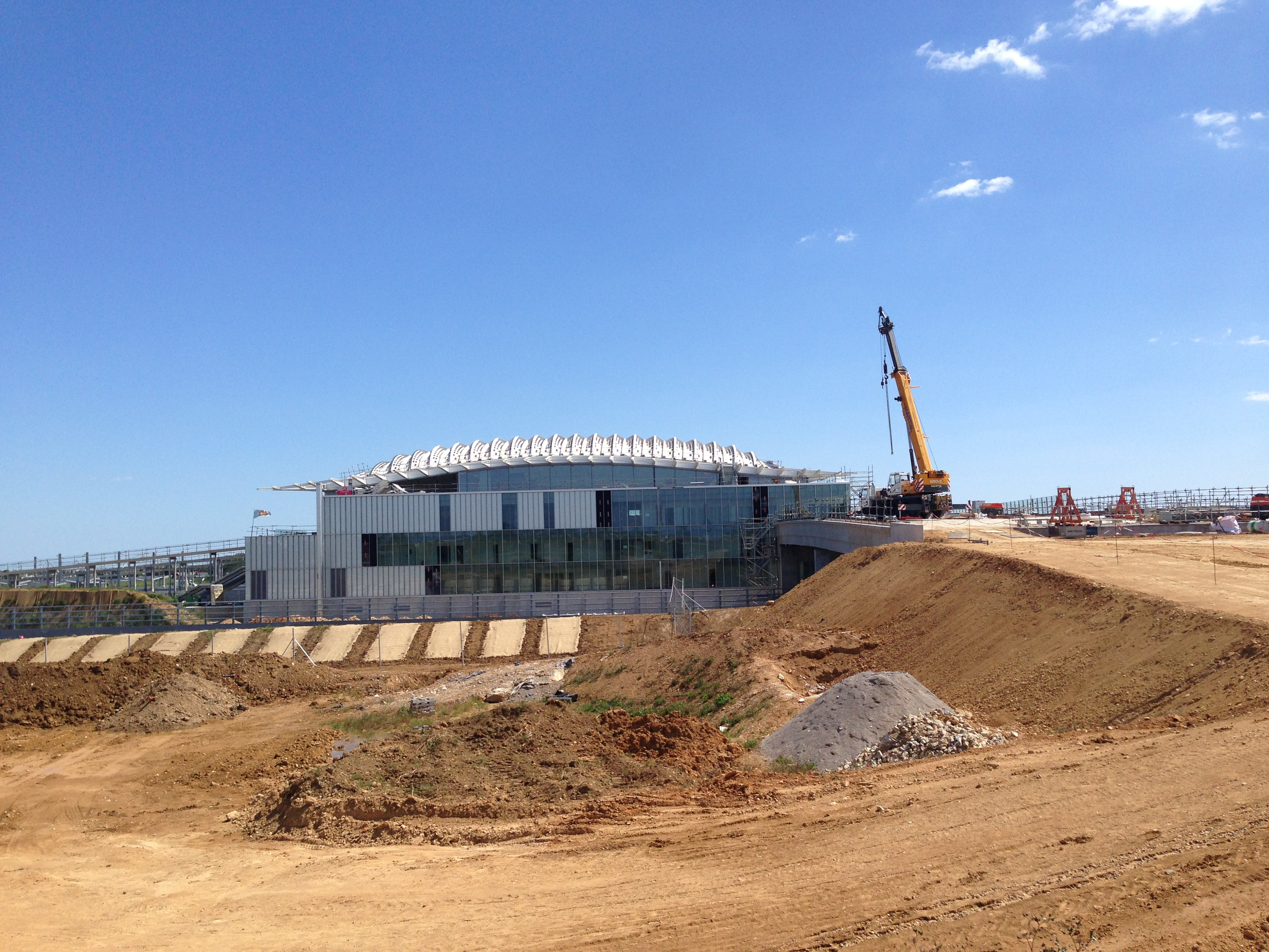 Gare de Montpellier Sud de France (Montpellier, Hérault, France).